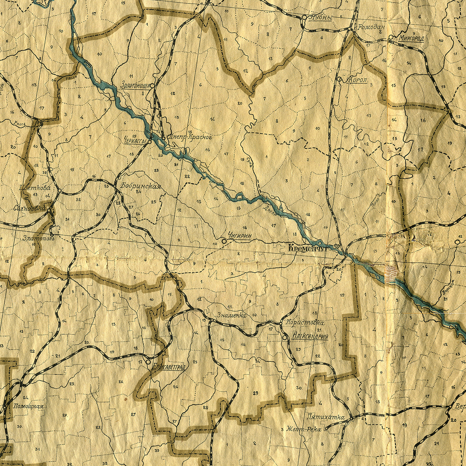 Кременчуцька губернія, фрагмент мапи Української соц. рад. республіки, 1921